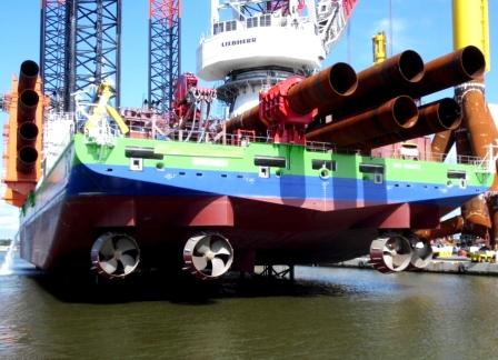 Die Innovation Bremerhaven, Bilick auf den Schottelantrieb